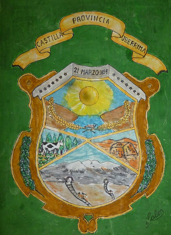 Escudo creado por José Eduardo Rodriguez Jara